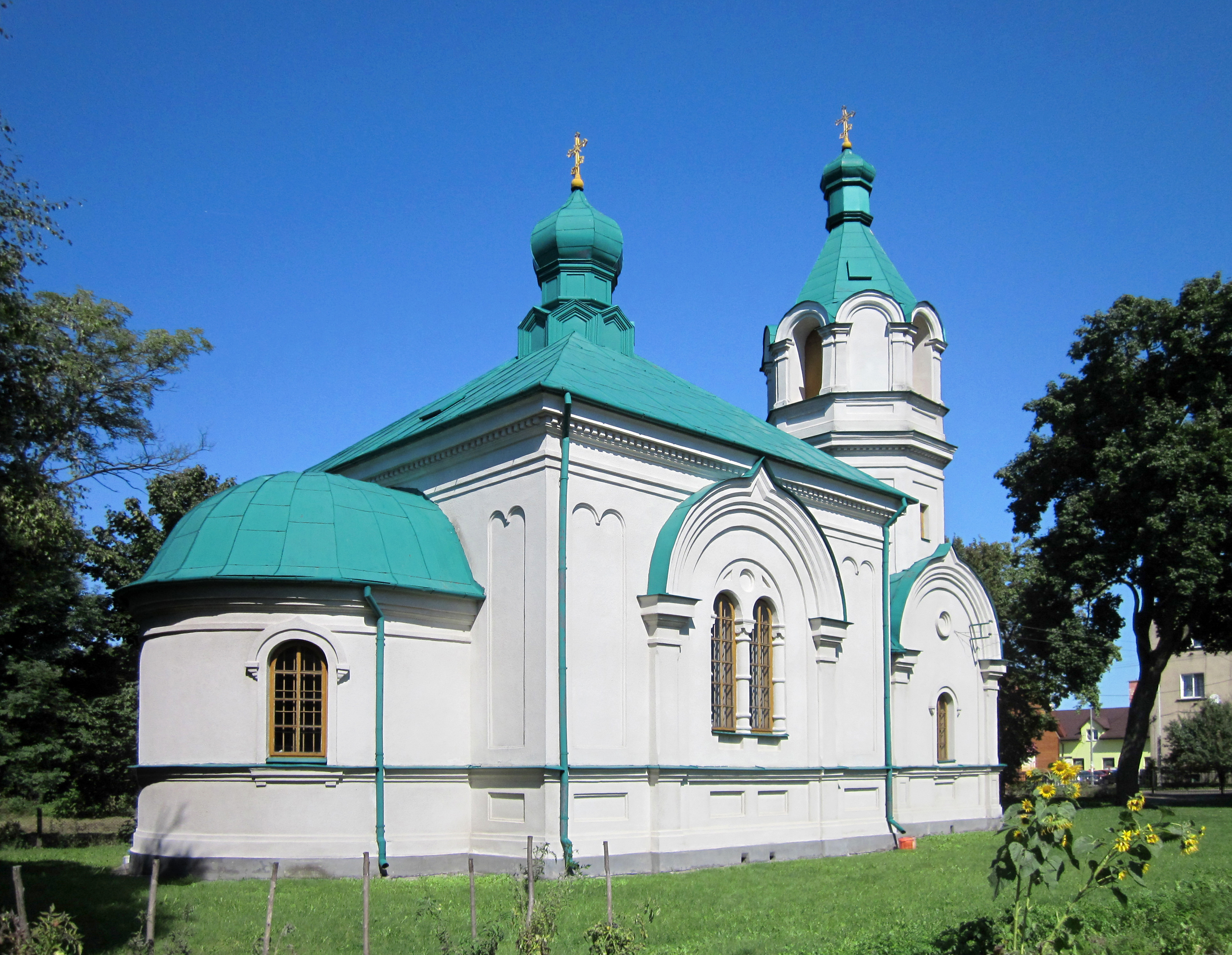 Cerkiew ta znajduje się w Ciechanowcu przy ul. Mickiewicza, została wybudowana 1864 r., według o. G. Sosny ,, w 1877 r. wybudowano murowano cerkiew, która przetrwała do naszych czasów”. Według M. Kałamajskiej-Saeed wzniesiono w 1875 r. inne źródła podają datę, np. 1884. Wiadomo natomiast, iż cerkiew ta stoi na cmentarnym placu unickim, na który przeniesiono w 1730 r. unicką cerkiew z Malca. Obecnie przy cerkwi od ul. Pińczowskiej znajduje się ogród warzywny.